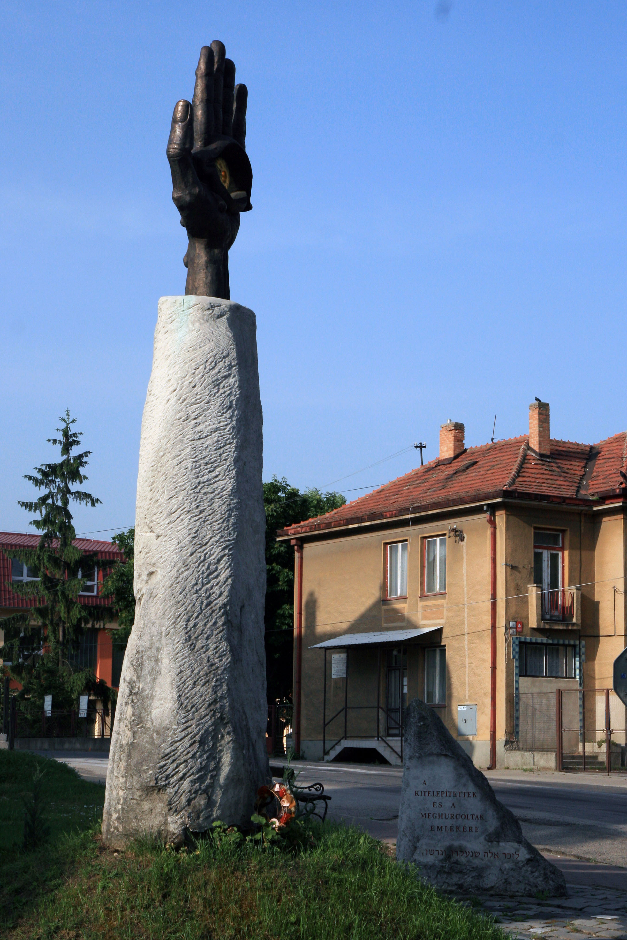 Memorial in Dvory nad Žitavou/Udvard